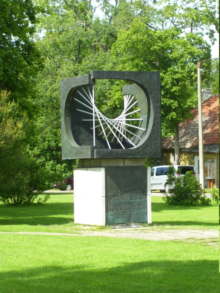 Kärdla, Vabrikuväljak, endise kalevivabriku mälestusmärk